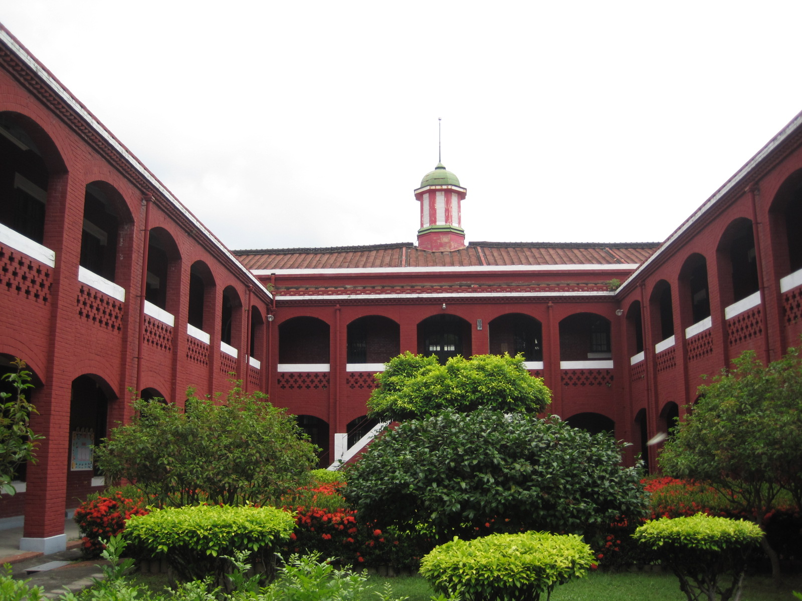 中文（台灣）: 原臺南長老教女學校本館背面